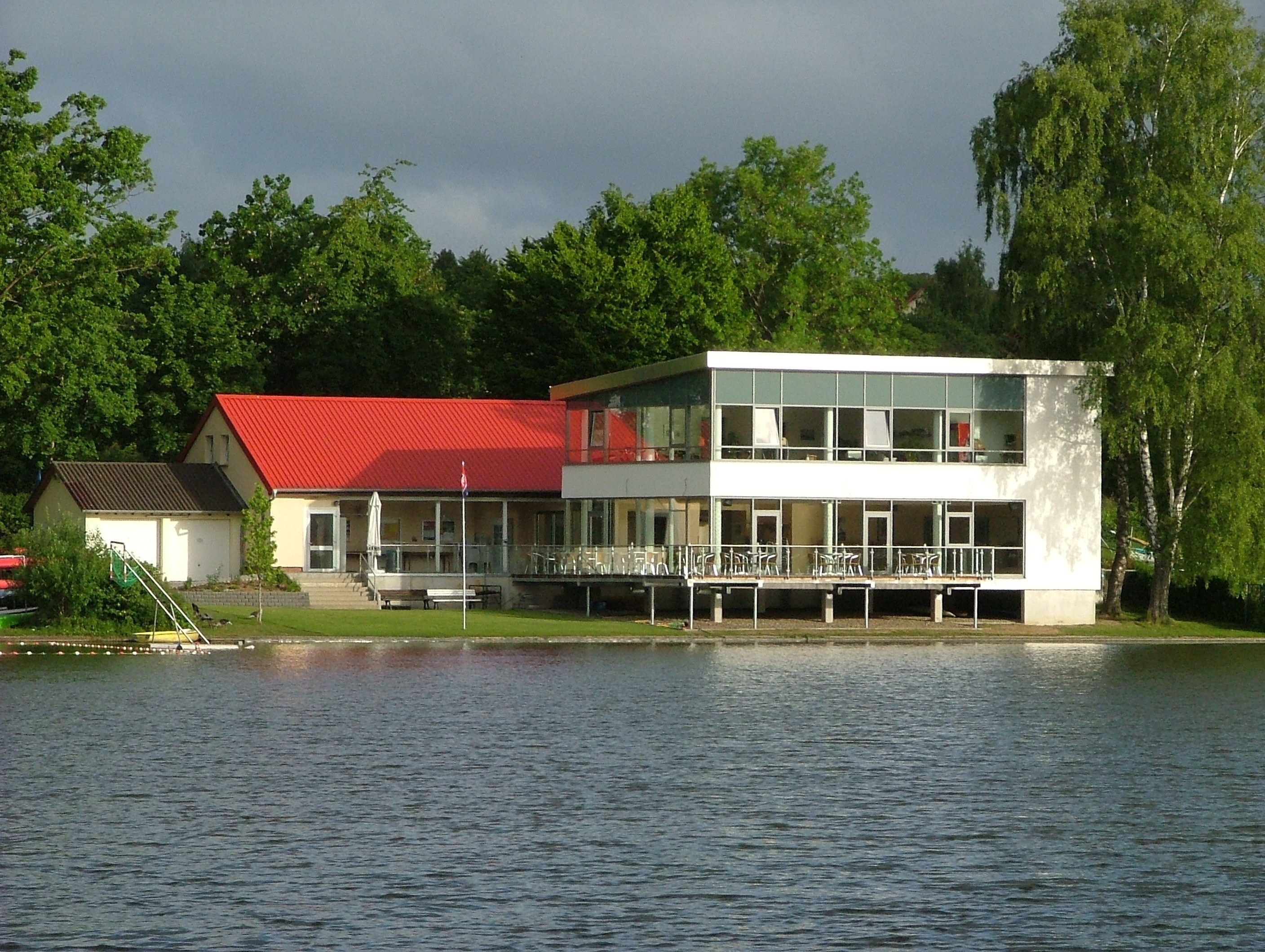 Sport- und Gesundheitszentrum am Kiessee (Vereinshaus der Wassersportvereinigung Göttingen von 1908 e.V.)